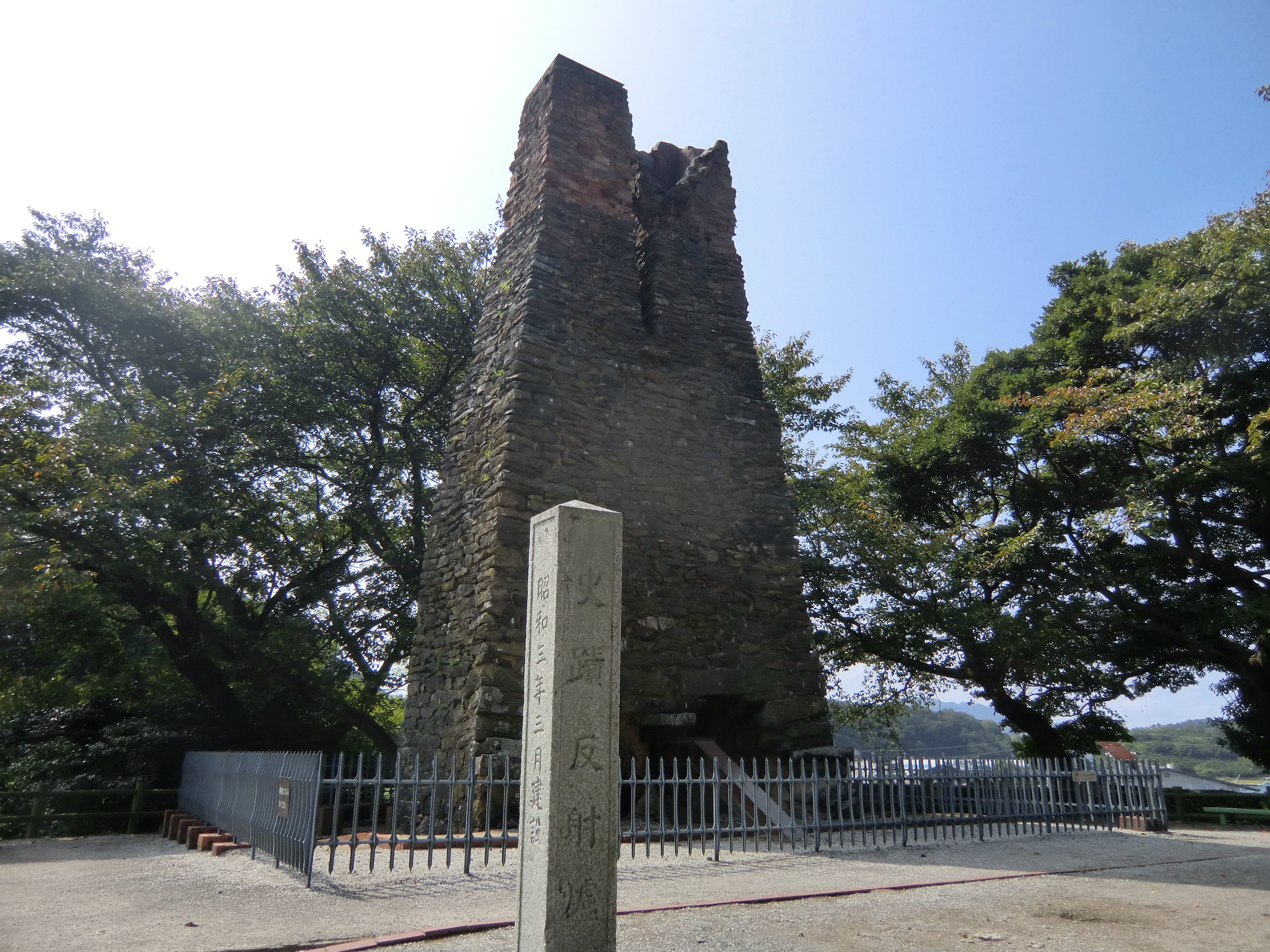 試験炉と推定されている萩反射炉（萩市）。現存する煙突部の遺構。